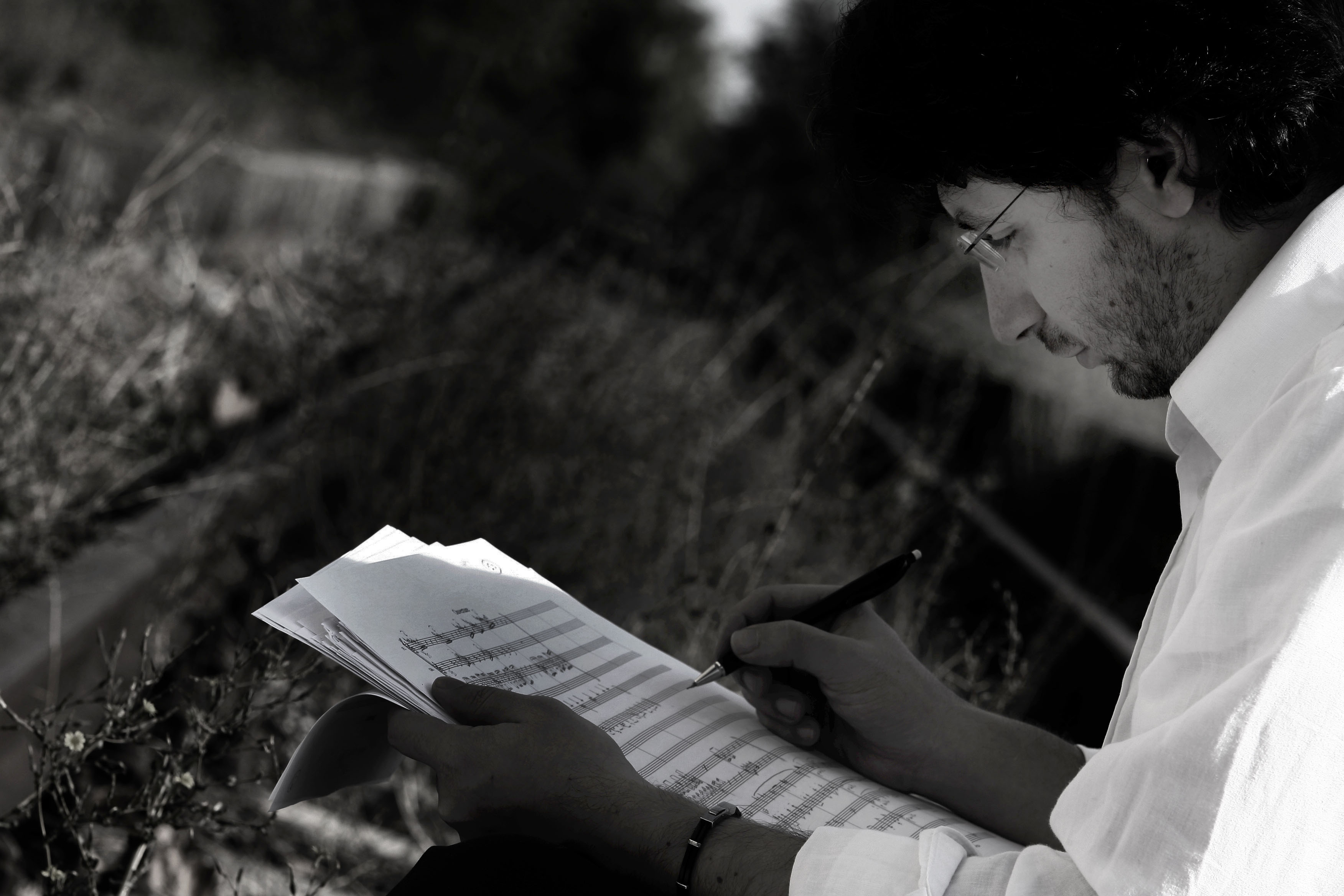 Cristian Carrara